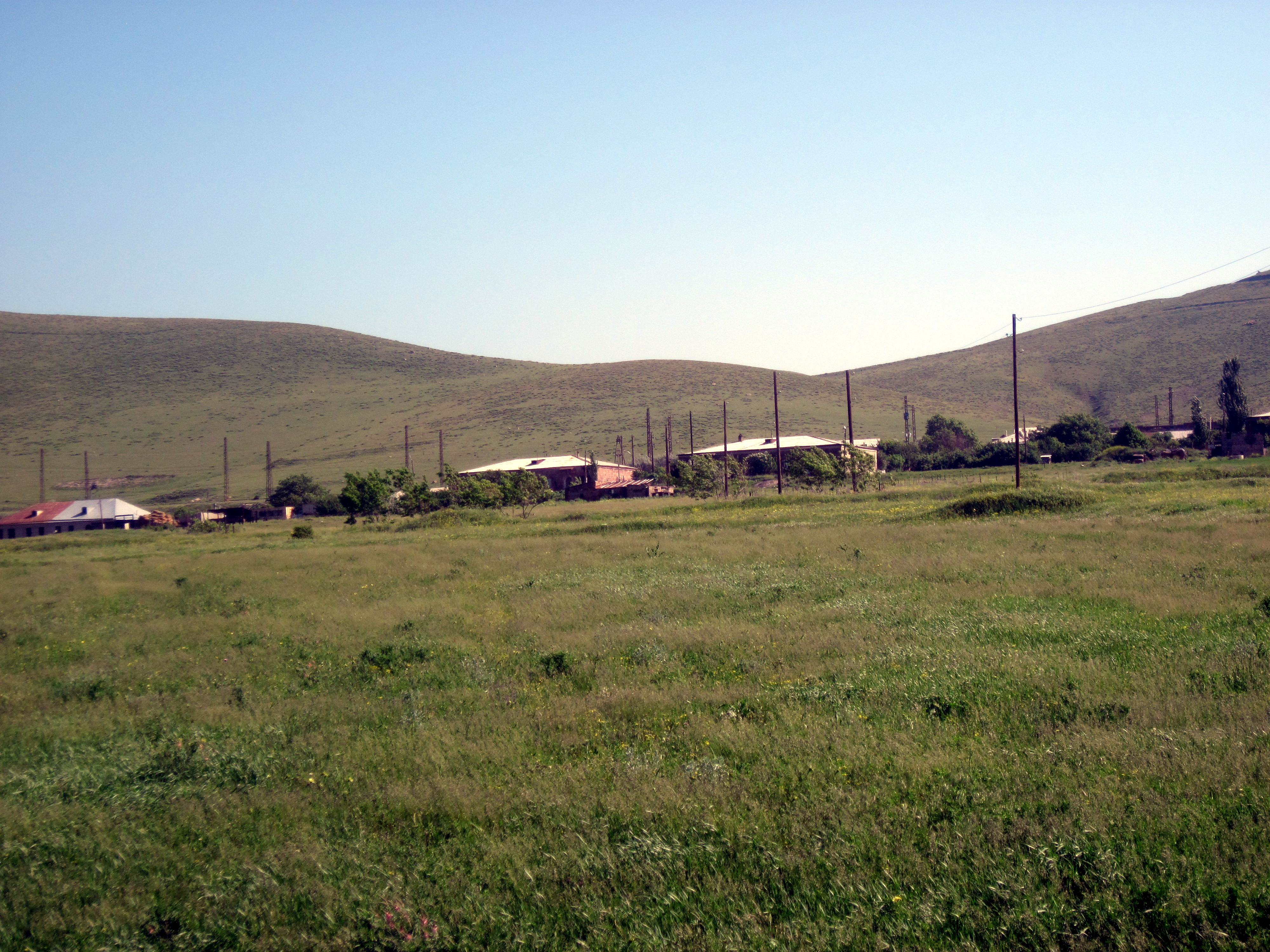 Հացիկավան գյուղ